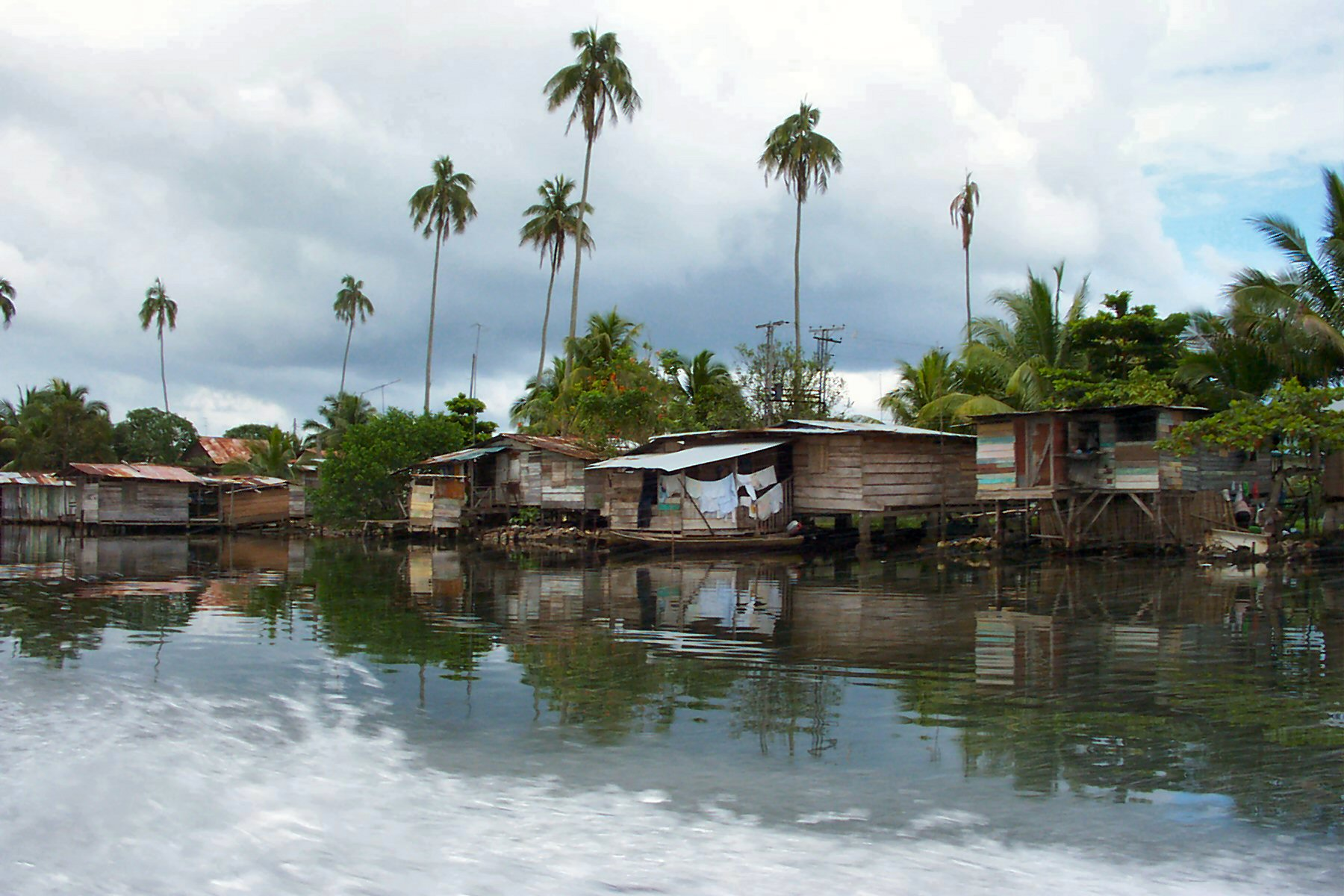 Almirante, Panama.